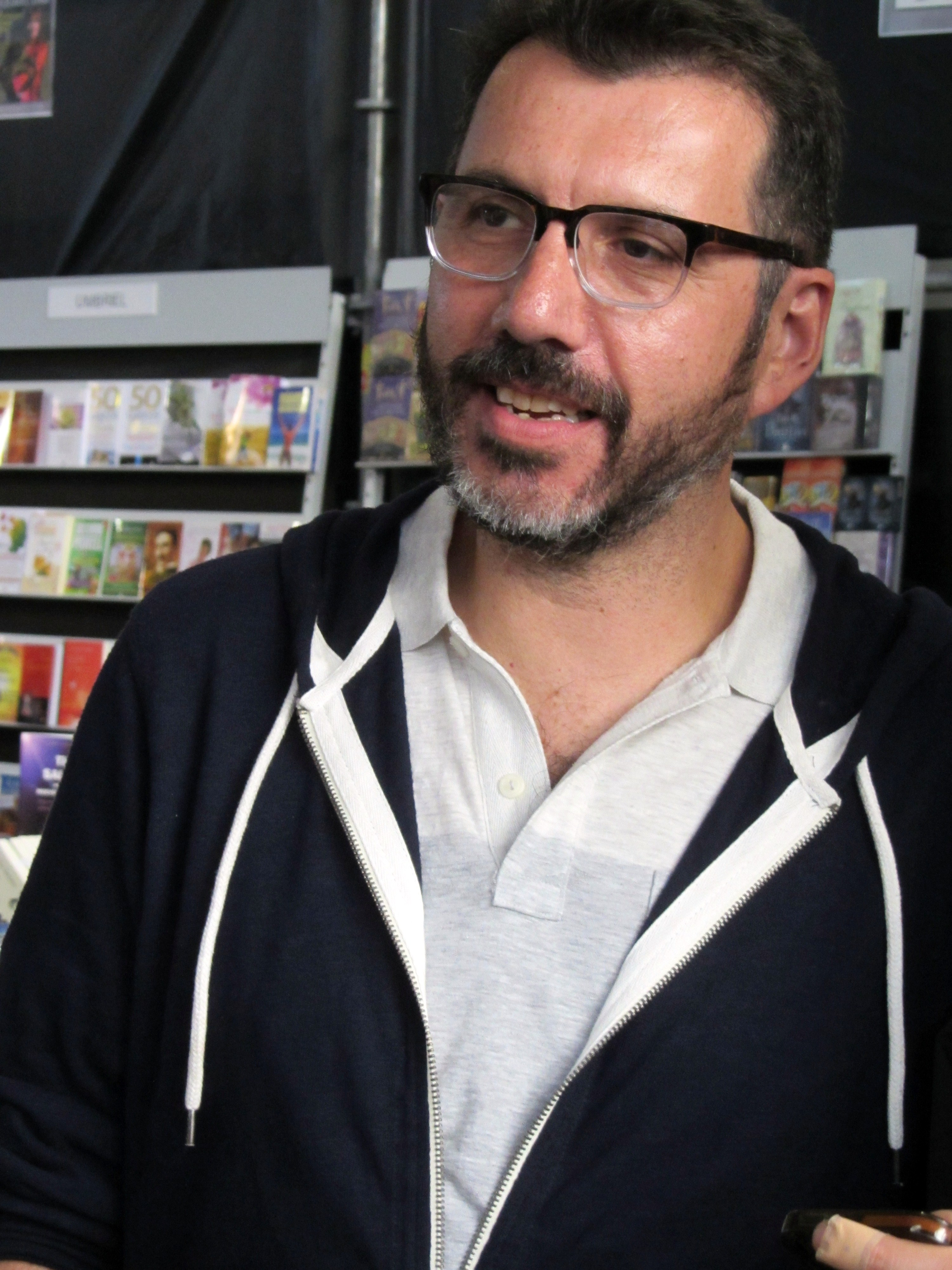 El escritor y cineasta chileno Alberto Fuguet en la Feria Internacional del Libro de Santiago 2015